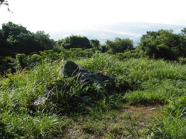 藤尾山山頂